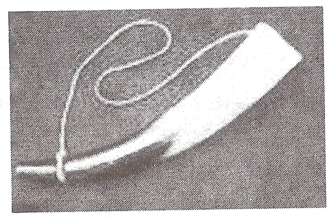 குறும்பரந்தூம்பு - சங்ககால இசைக்கருவி. பத்துப்பாட்டு செய்தி உரை என்னும் எனது நூலிலிருந்து எடுத்துப்பதிவேற்றப்பட்டது.